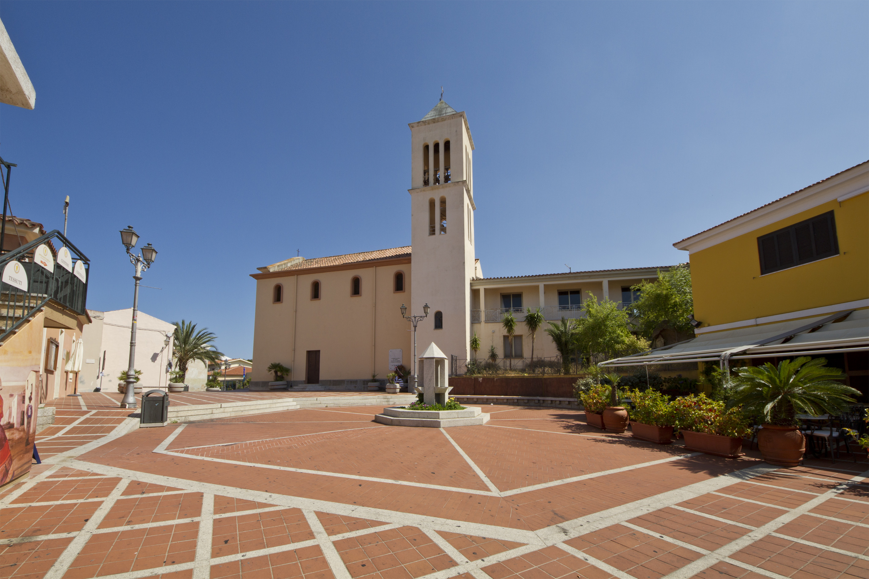 Chiesa San Antonio